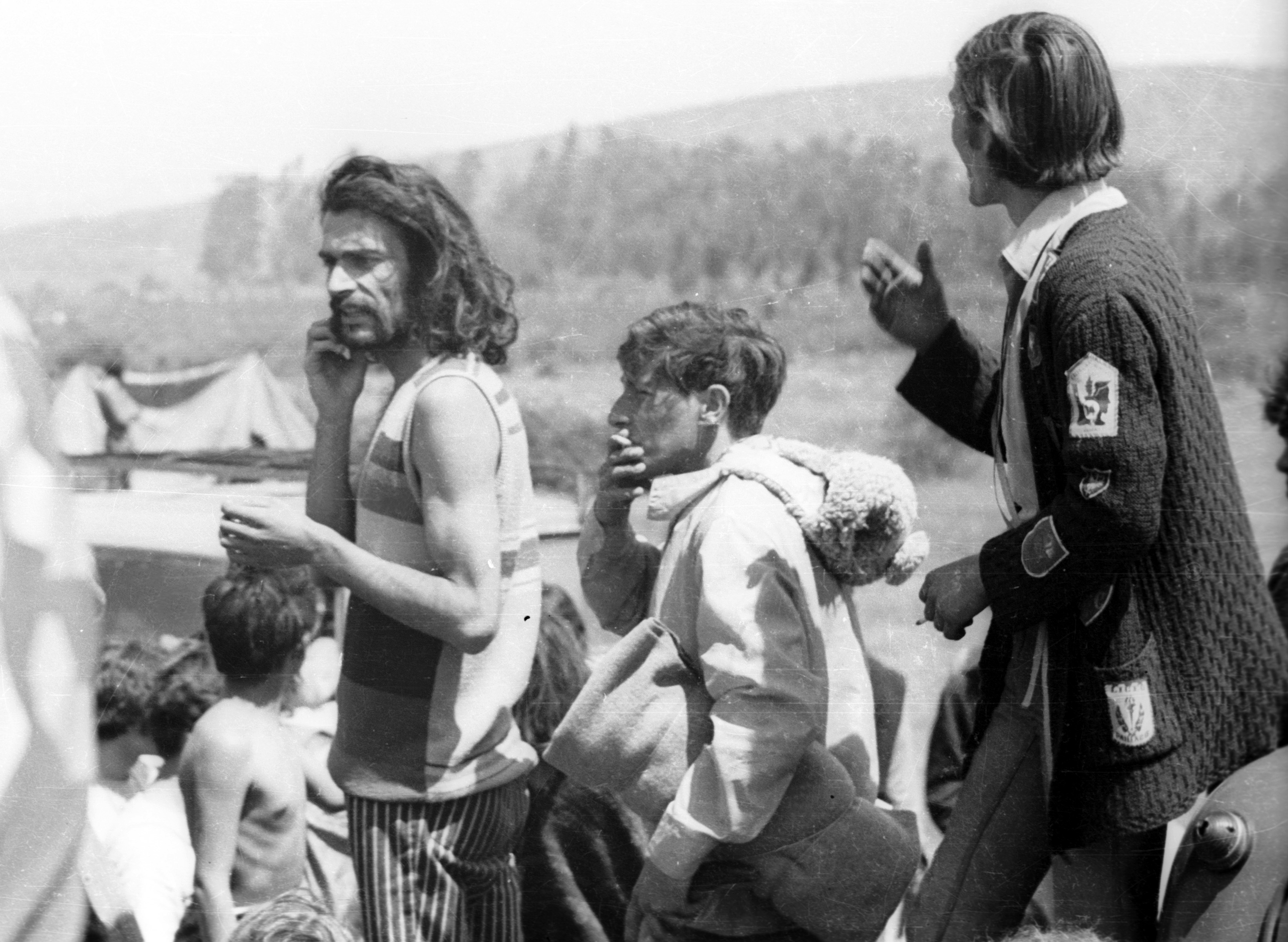 Eduardo Parra Pizarro (n. Los Andes, 24 de agosto de 1943) es un poeta y músico chileno. Se ha desempeñado como teclista y letrista del grupo Los Jaivas.